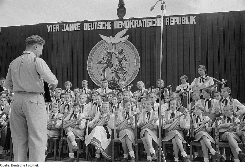 Original image description from the Deutsche Fotothek Auftritt eines Pionierchores bei einer Veranstaltung anläßlich des Tags der Republik